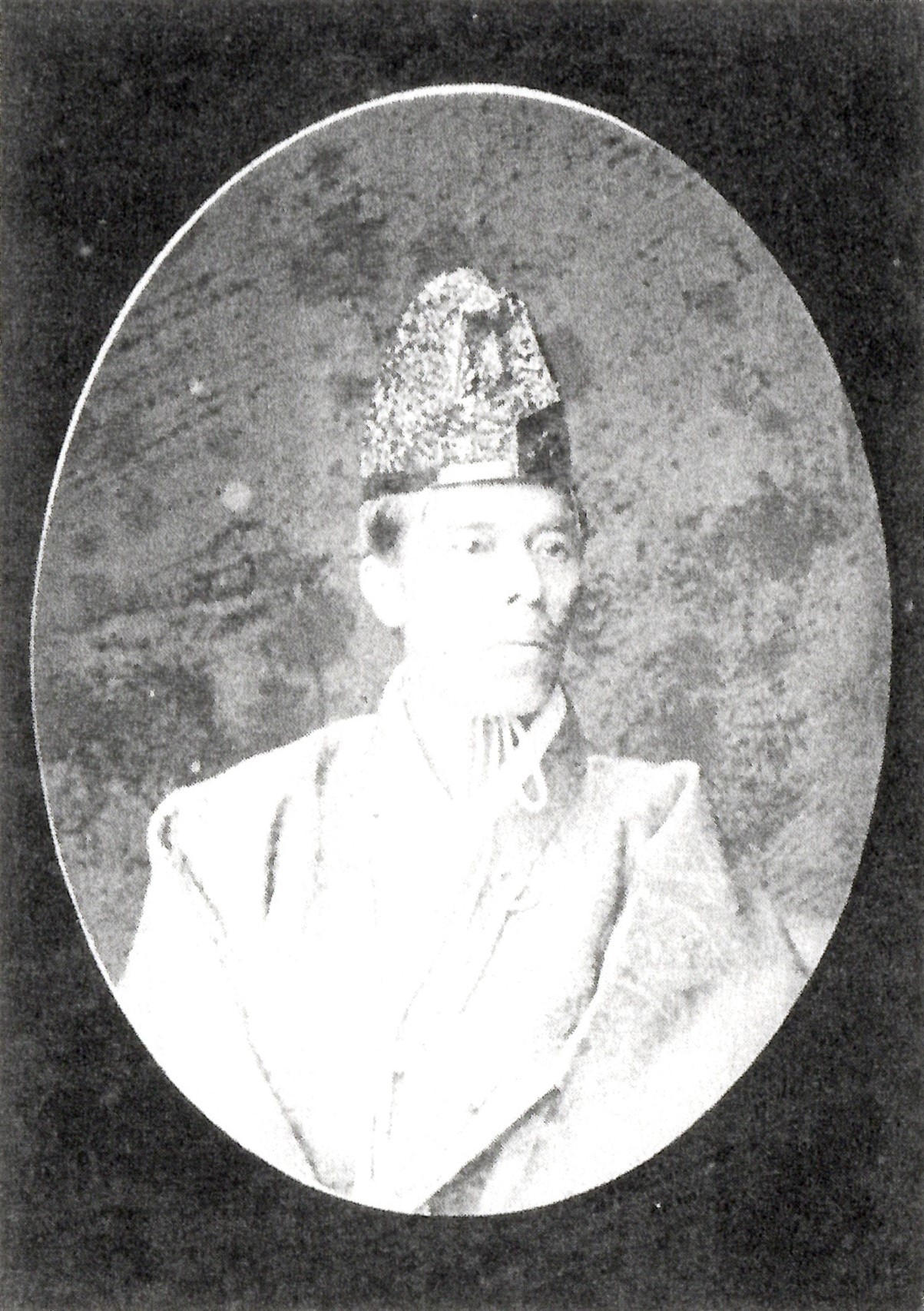 堀之美の肖像写真。